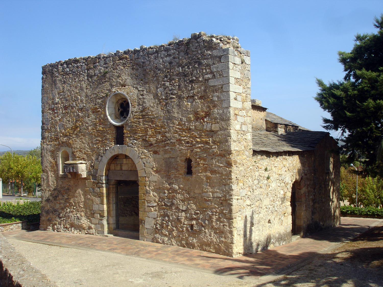 Esglèsia de Sant Joan de Bellcaire (Girona, Catalunya, Espanya)